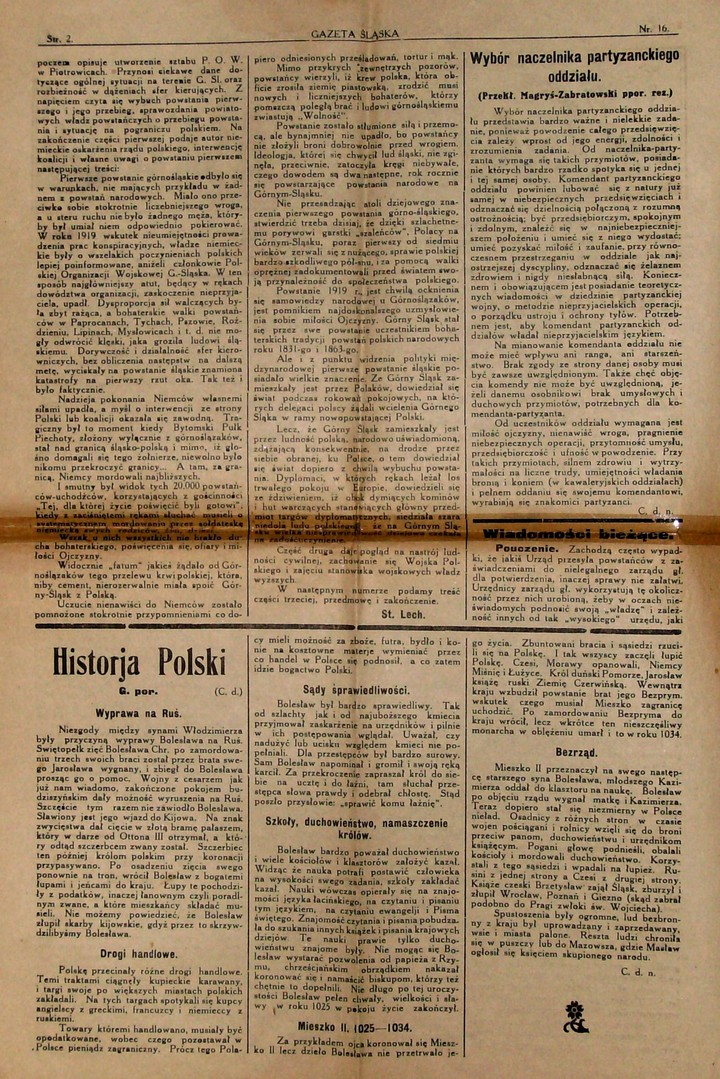 Gazeta Śląska z 1925, nr 16, s. 2